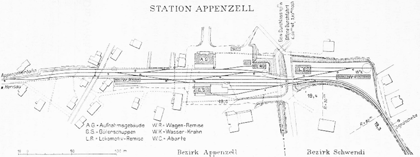 Lageplan der Station Appenzell nach der Eröffnung des Streckenabschnitts Gais–Appenzell